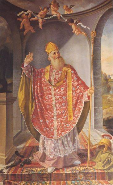 Quadro situato sull'altare maggiore (XVIII secolo)